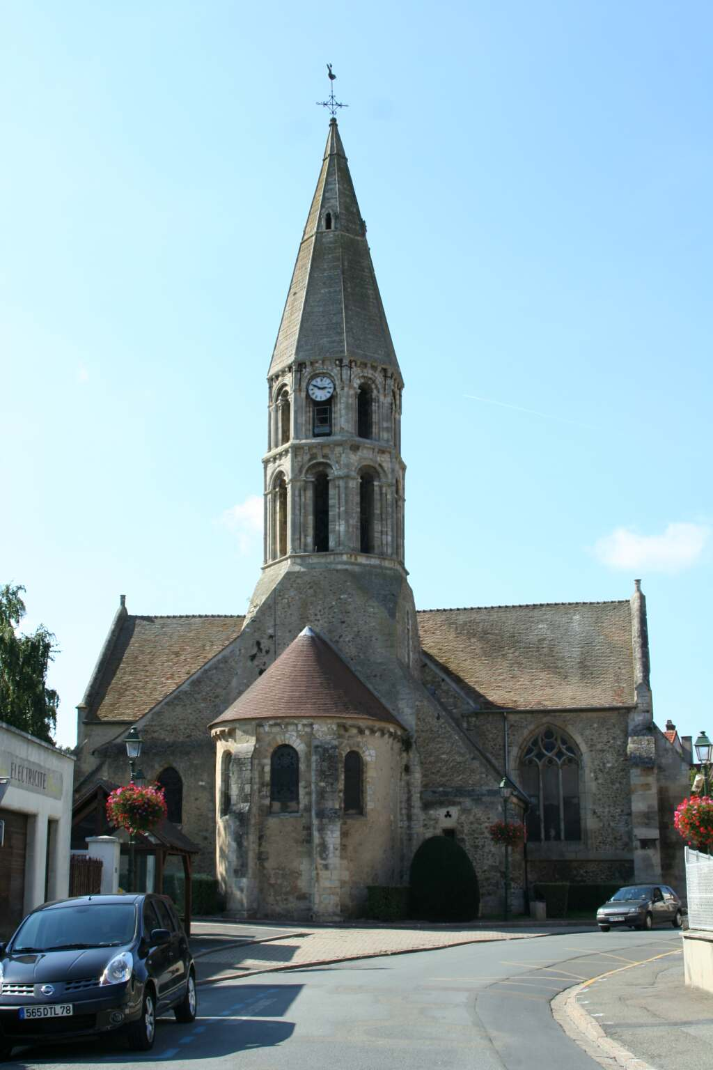 Église d'Orgeval - Yvelines (France)